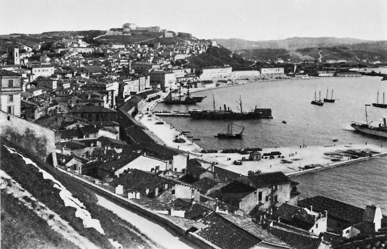 Gebrüder Alinari: Blick auf den Hafen von Ancona